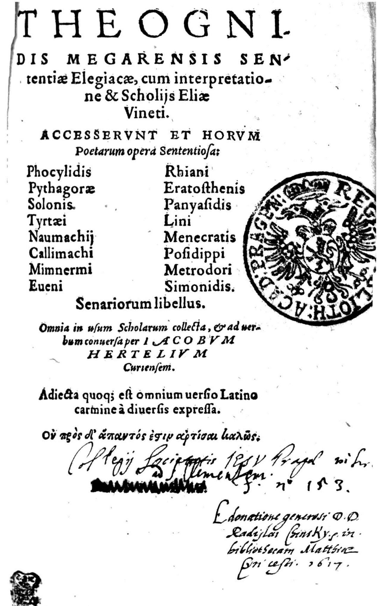 Vinet - Théognis de Mégare - Elegies (1572)